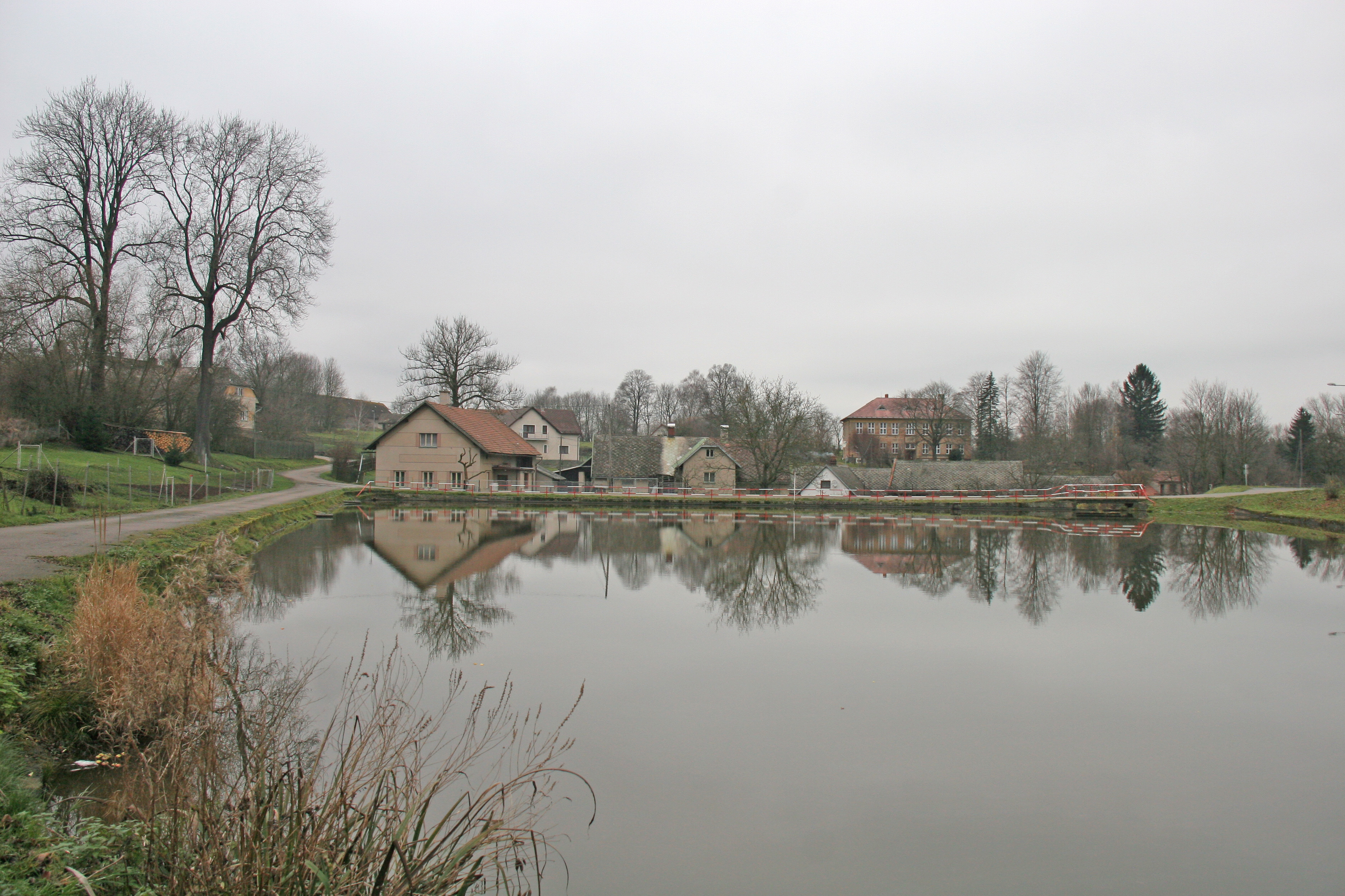 Libkov návesní rybník